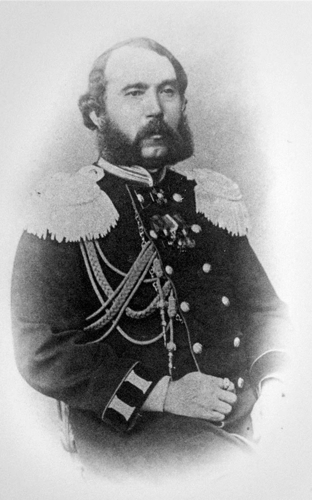 Обухов, Павел Матвеевич